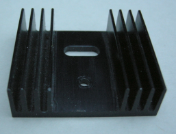 Een koelplaat voor een component in een TO-220 behuizing